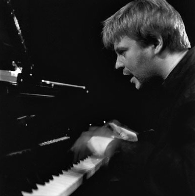 Patrick Bebelaar im Theaterhaus Stuttgart